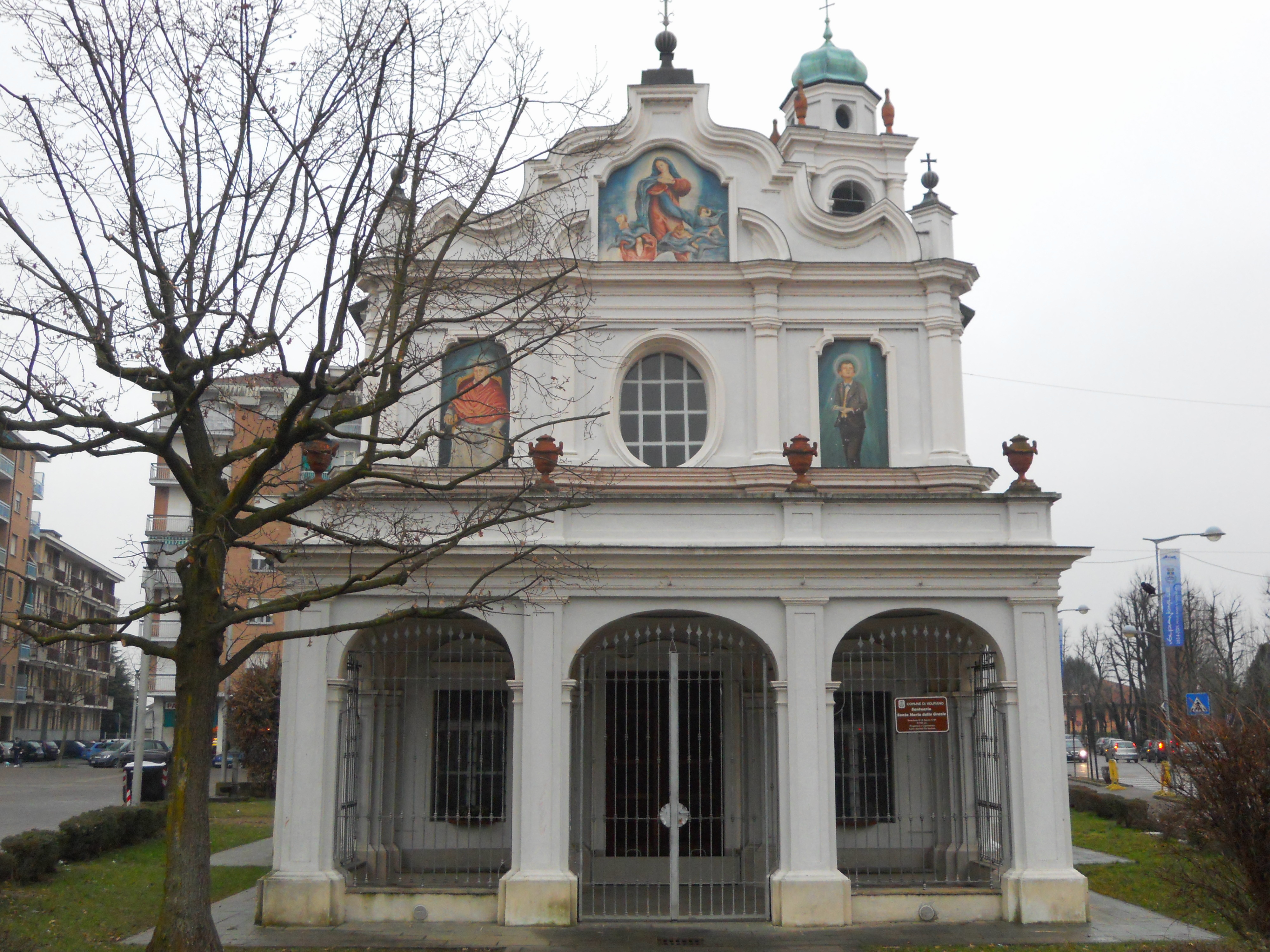 Santuario S. Maria delle Grazie